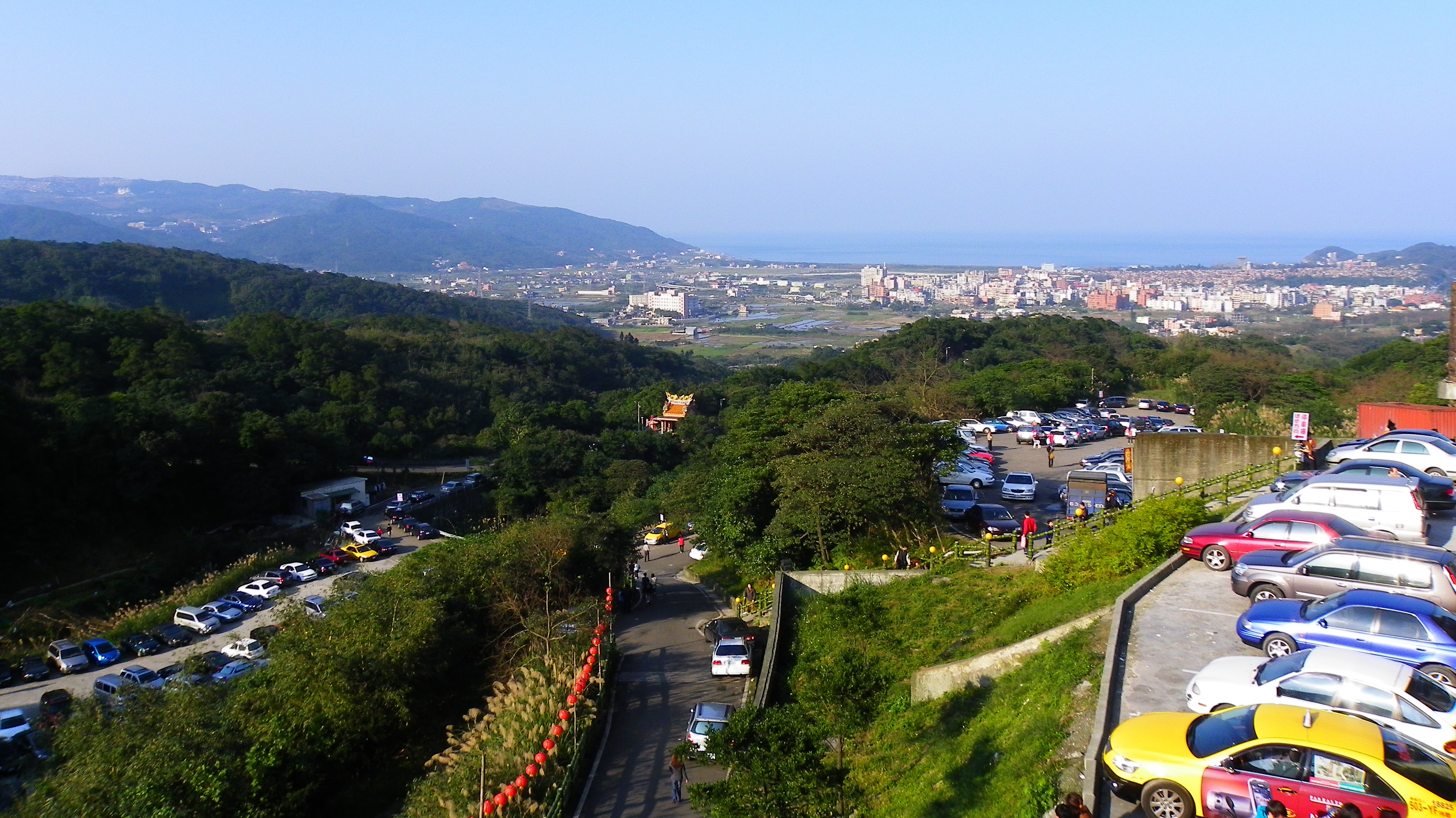 中文（台灣）: 從新北市萬里區公館崙金山財神廟前庭俯望萬里市街與北海岸。當天為農曆大年初四迎財神日，財神廟午後舉行法會，山路兩旁的臺地停車場都停滿車輛。